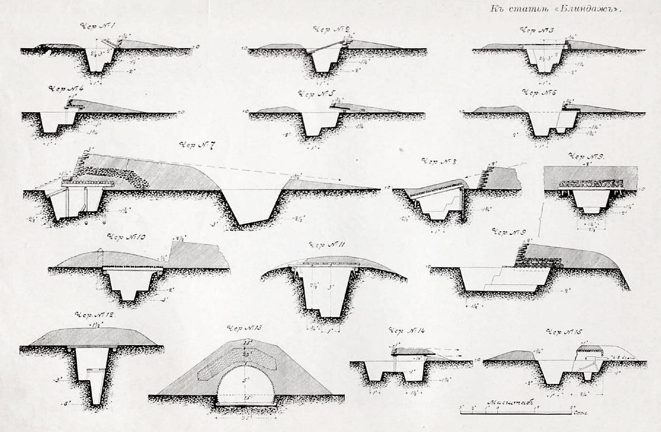 Данное изображение было использовано в статье «Блиндаж» опубликованной в четвёртом томе «Военной энциклопедии», который был издан книгоиздательским товариществом Ивана Дмитриевича Сытина в 1911 году в столице Российской империи городе Санкт-Петербурге.